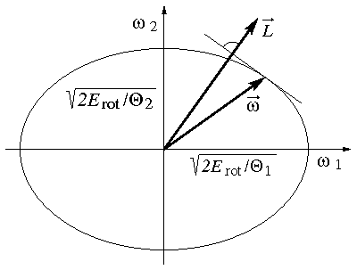 Schnitt durch ein Energie-Ellipsoid